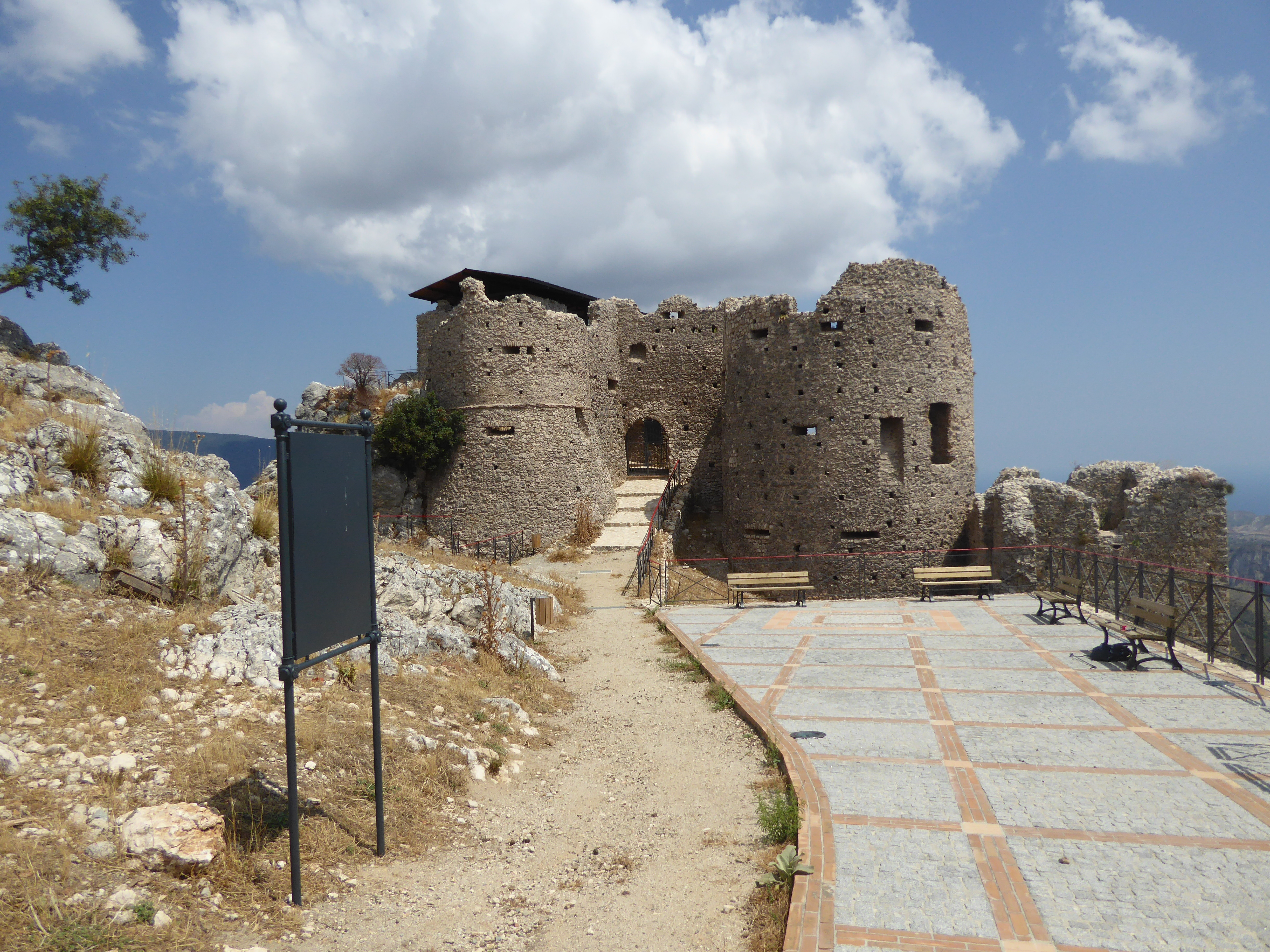 Castello Normanno di Stilo 2016